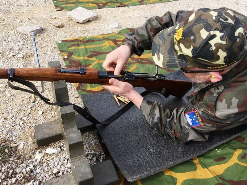 Polnjenje puške M48.